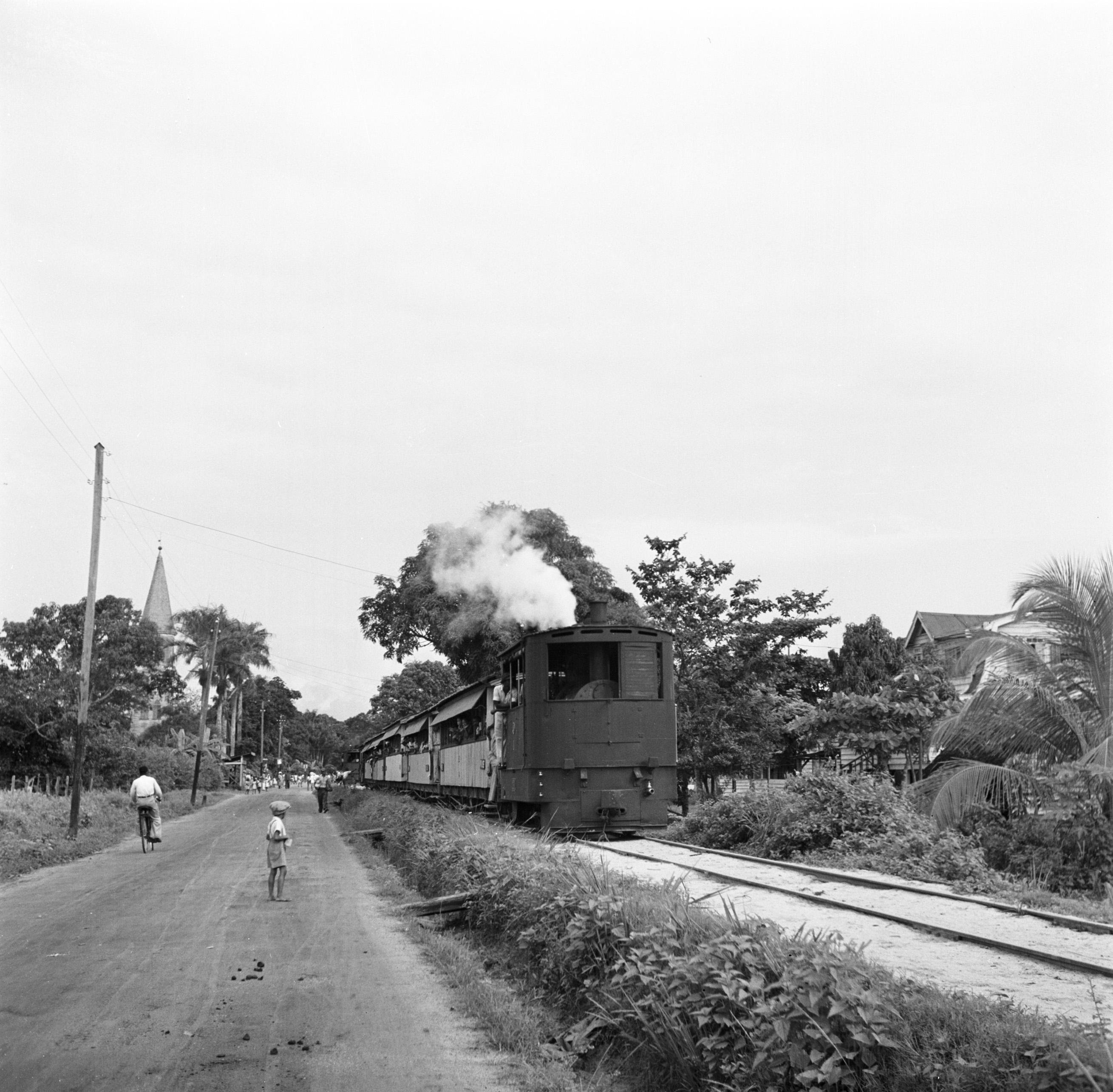 Die Lawabahn in Suriname